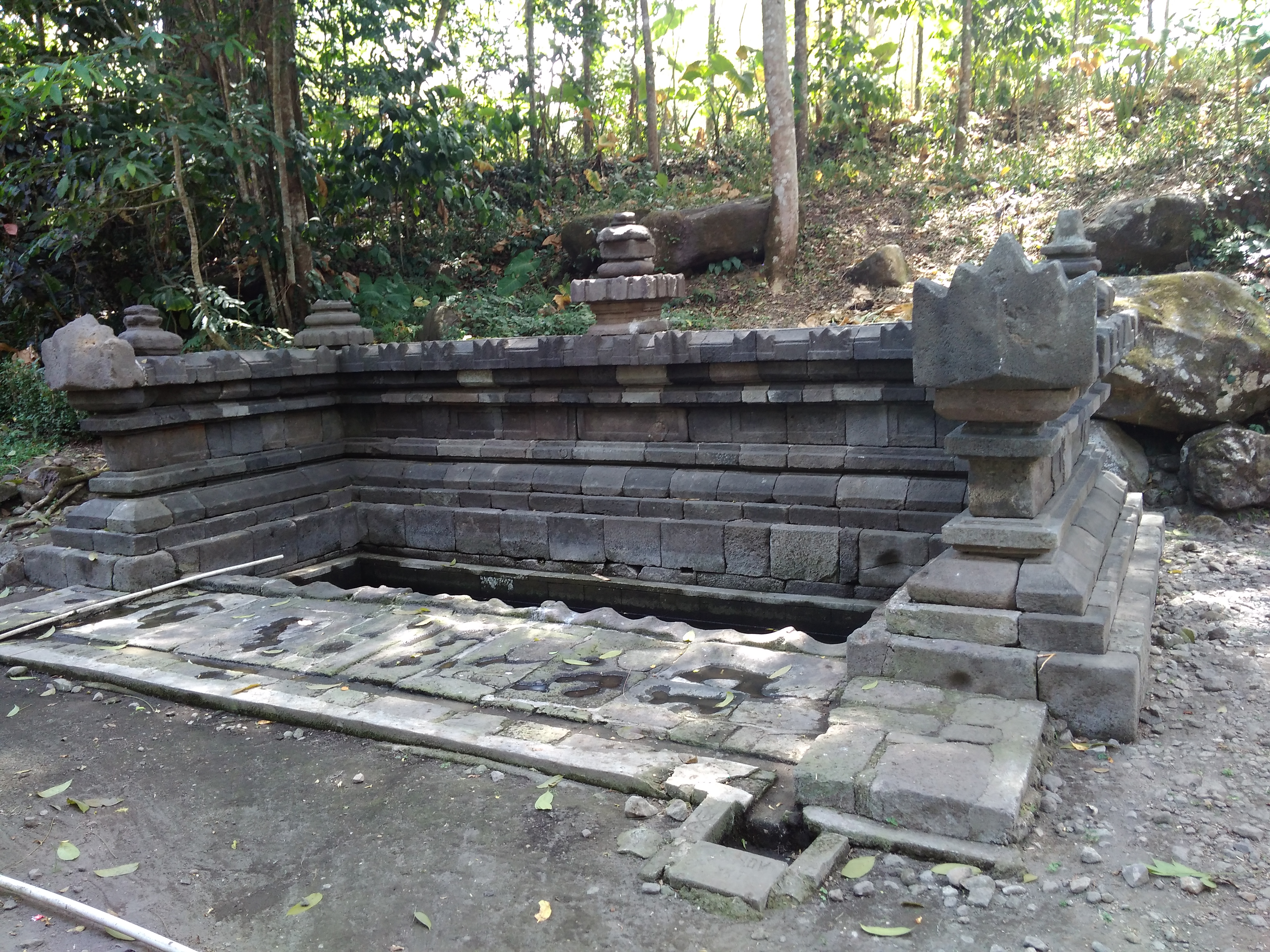 Situs Petirtaan Cabean Kunti di Boyolali